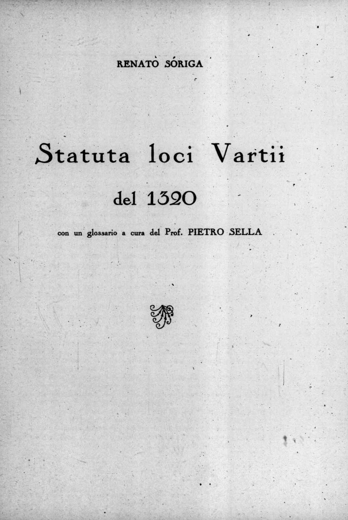 Frontespizio